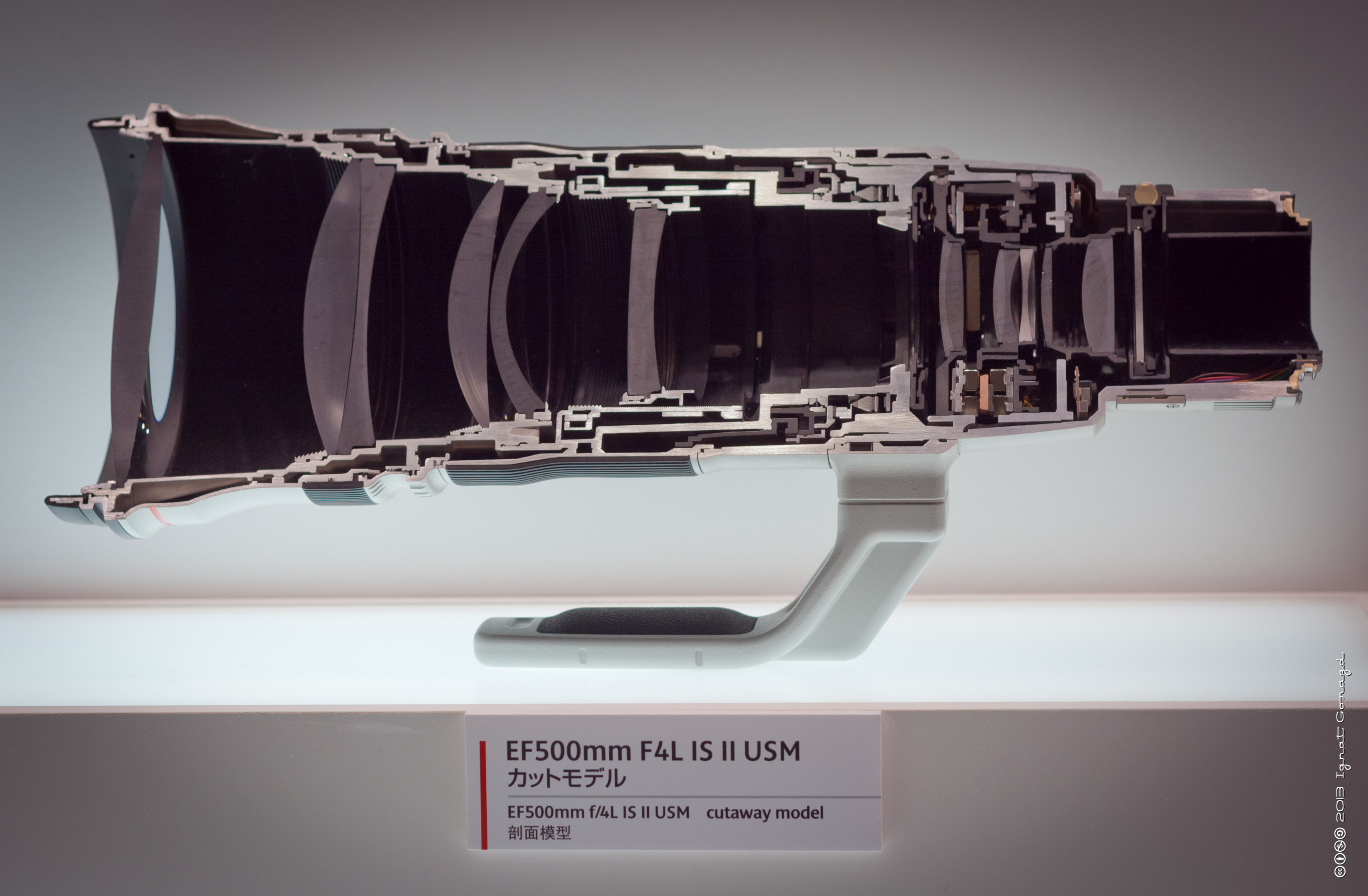 Canon EF lens @CP+